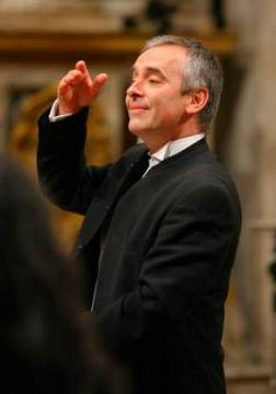 foto scattata Jacobus